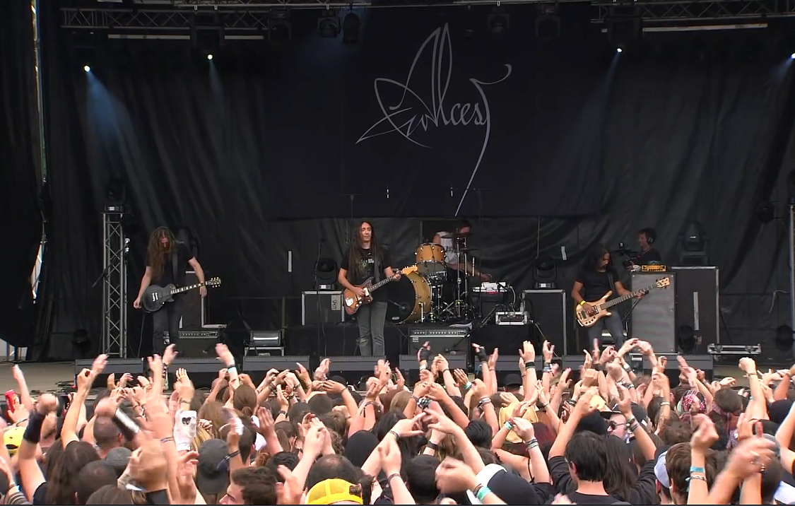 Alcest